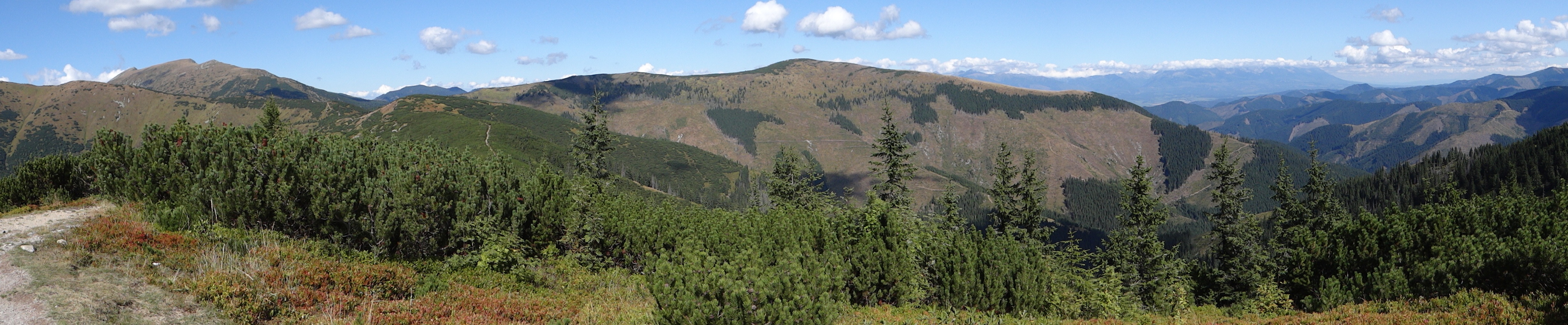 Rovienky